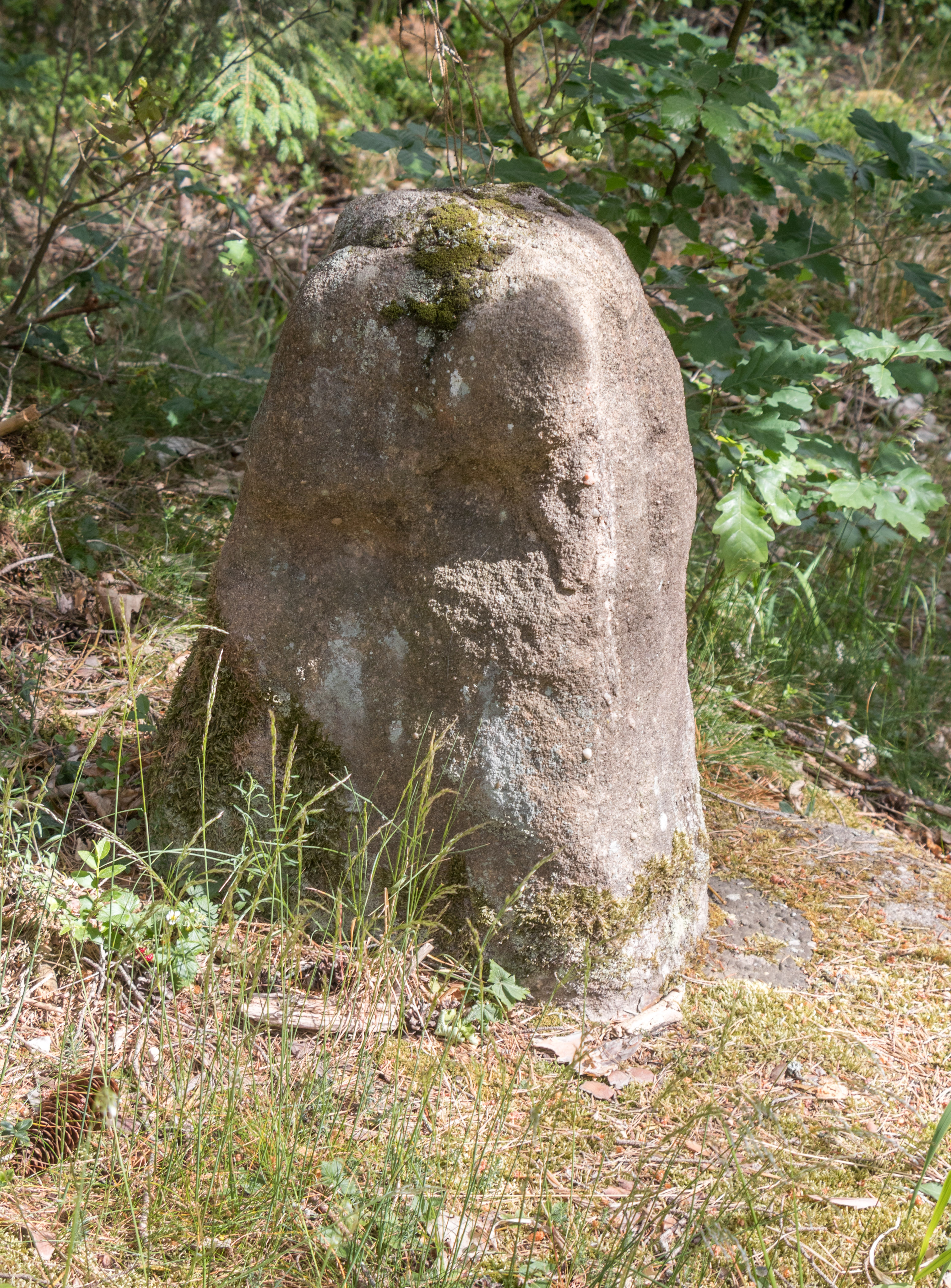 Herzog-Ernst-Kreuz, Heidenberg, Büchenbach